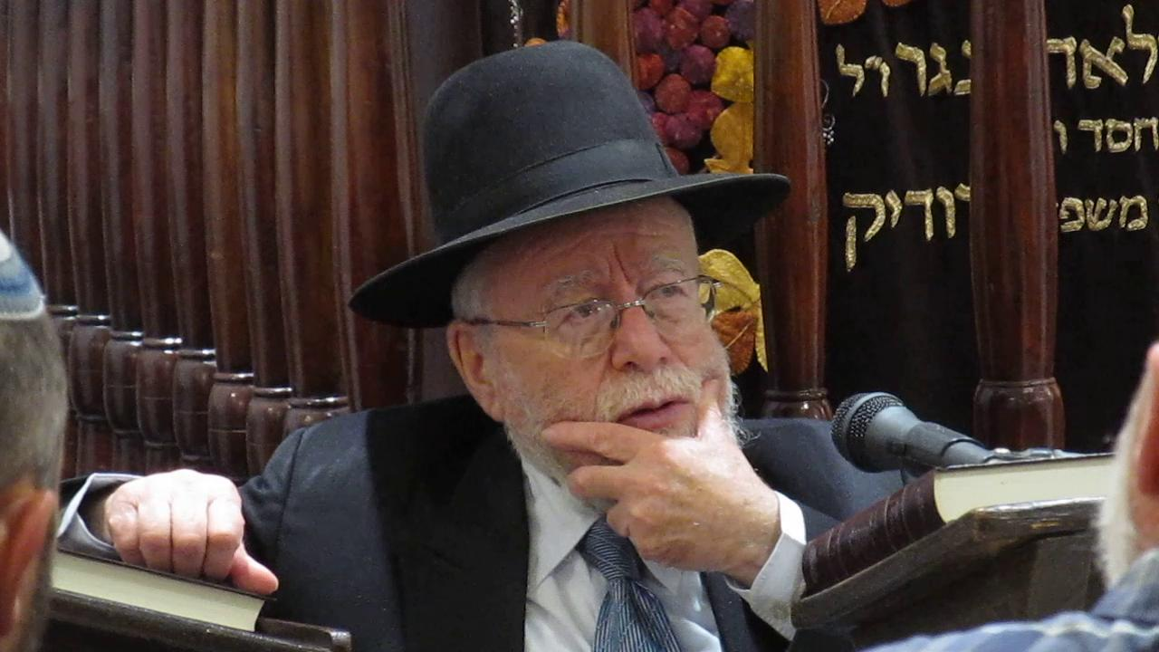 הרב דב ליאור בשיעור בבית הרב, ראש חודש אייר התשעג 2013